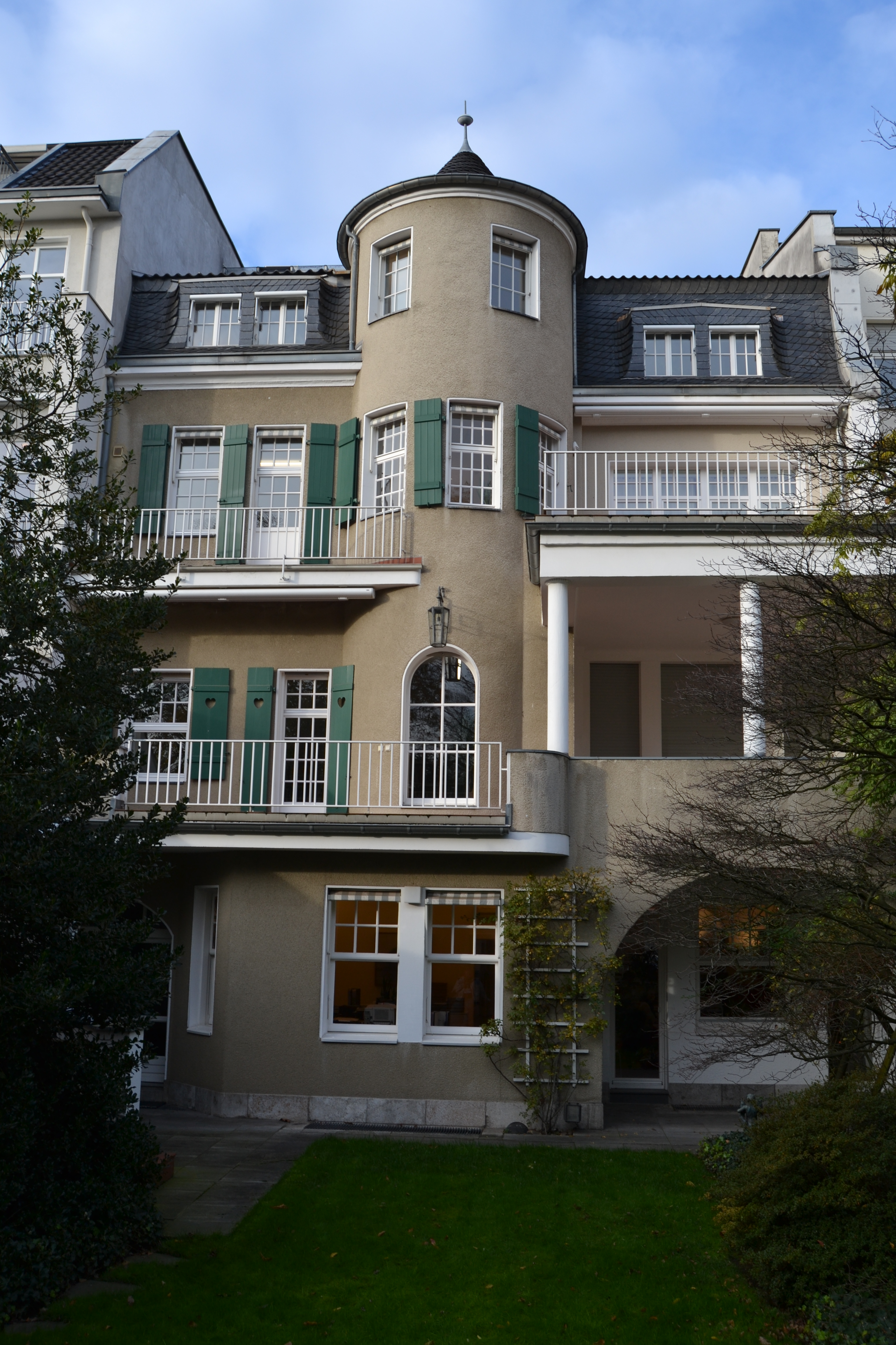 Baudenkmal Malkastenstraße 15 in Düsseldorf, Blick von der Gartenseite; Sitz der Gerda Henkel Stiftung.